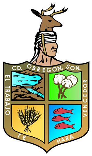 Escudo del municipio sonorense.